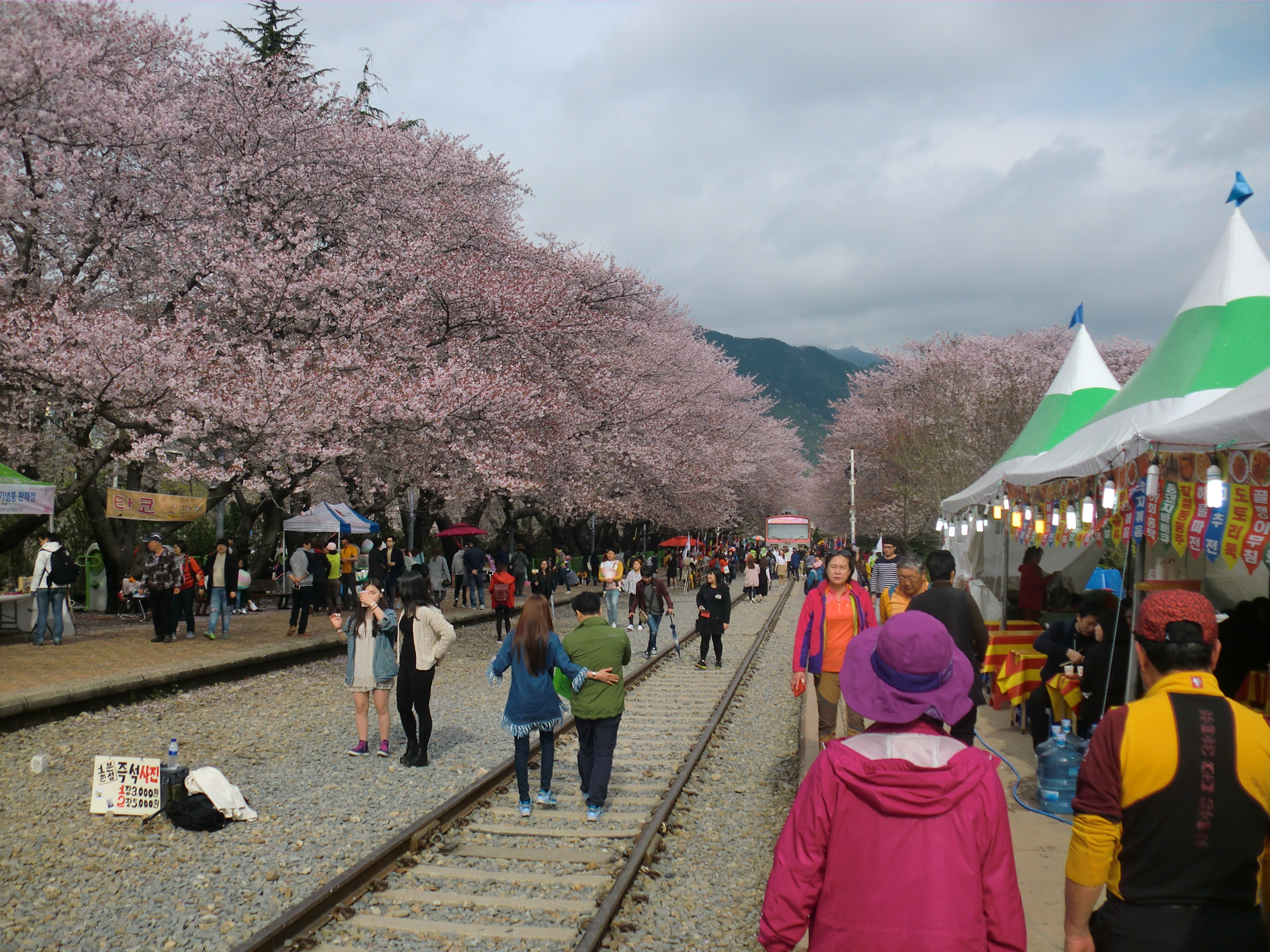 2016년 진해군항제 경화역구내